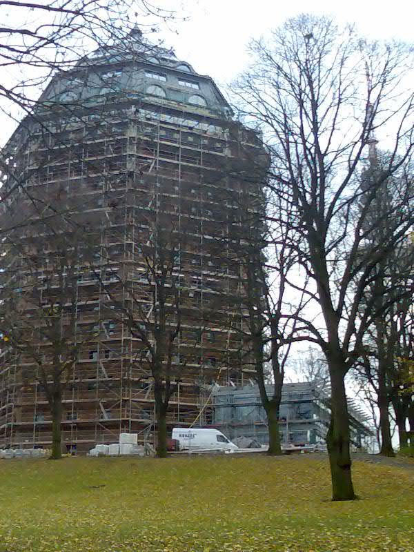 Schanzenturm Glasanbau.This is a photograph of an architectural monument.